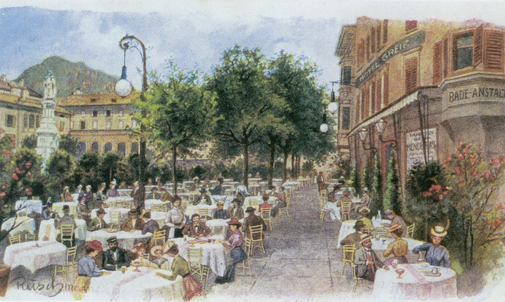 Waltherplatz in Bozen im Jahr 1894 auf einer gemalten Ansichtskarte